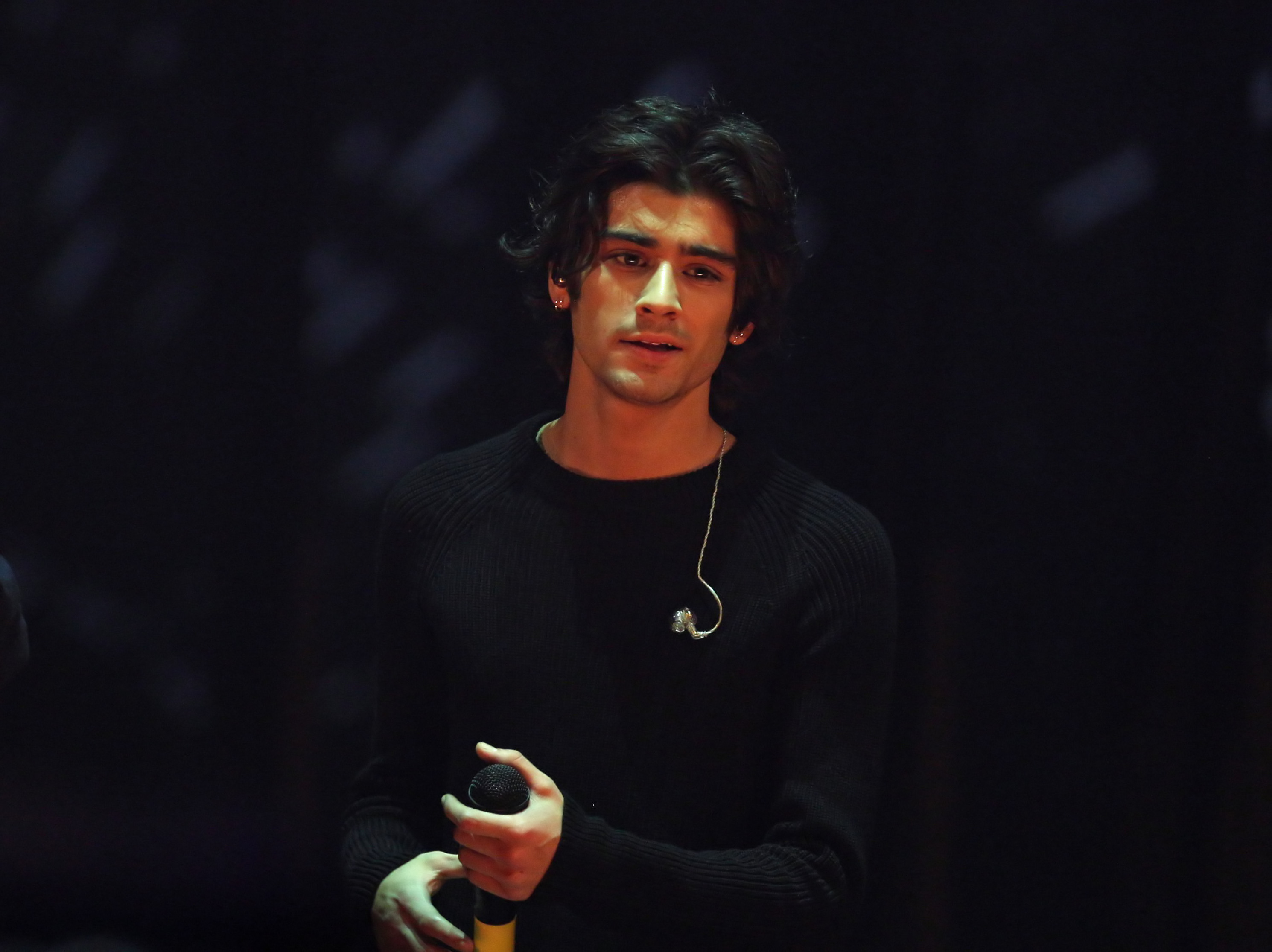 Wetten, dass.. ? 214. show in Graz, 8. Nov. 2014 Zayn Malik at 2014. Wetten, dass.. ? show in Graz, 8. Nov. 2014